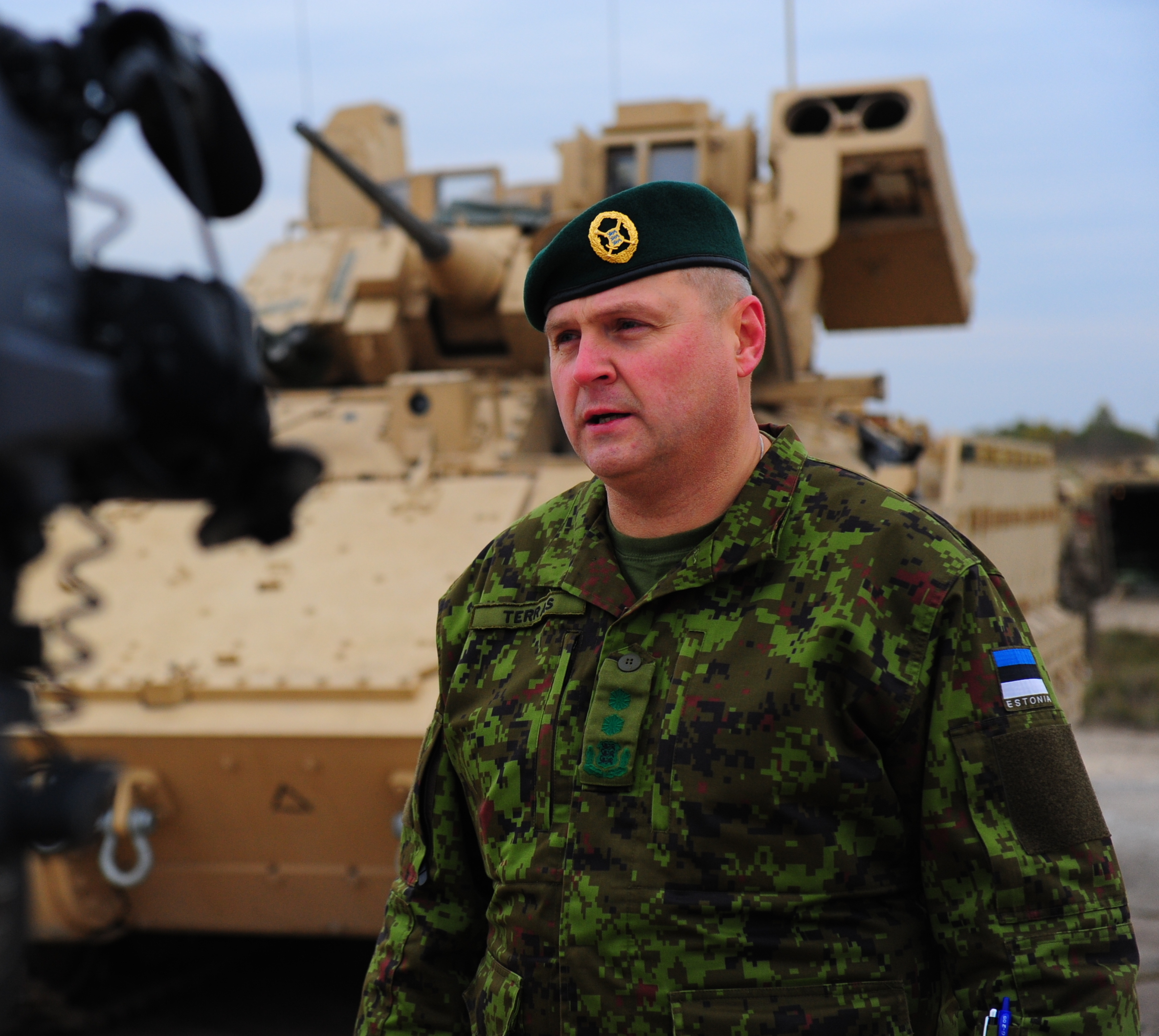 Kindralmajor Riho Terras intervjuud andmas